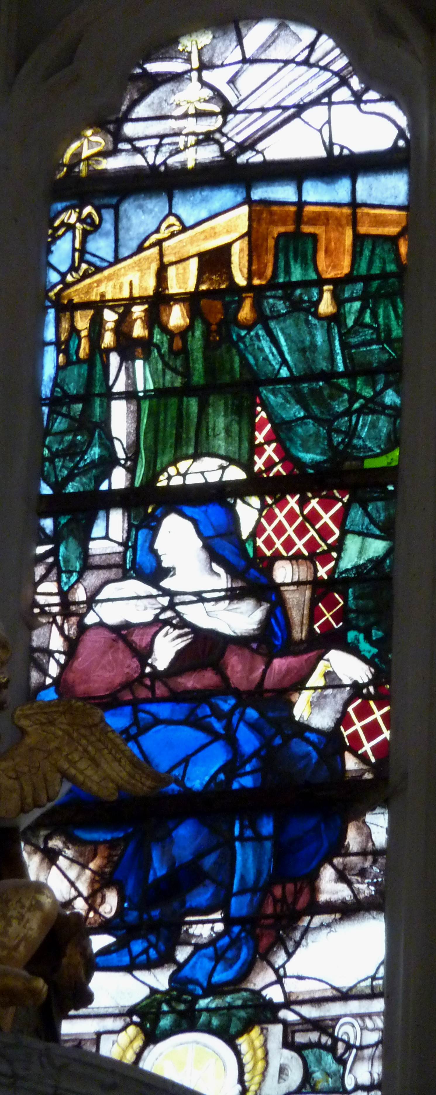 Ausschnitt des Bleiglasfensters Nr. 0 in der katholischen Pfarrkirche Saint-Acceul in Écouen (siehe Mathieu Lours: Saint-Acceul d'Écouen. Une cage de verre en pays de France, éditée par l’Association Les Amis de Saint-Acceul; Darstellung: der Auferstandene erscheint Maria (Ausschnitt)